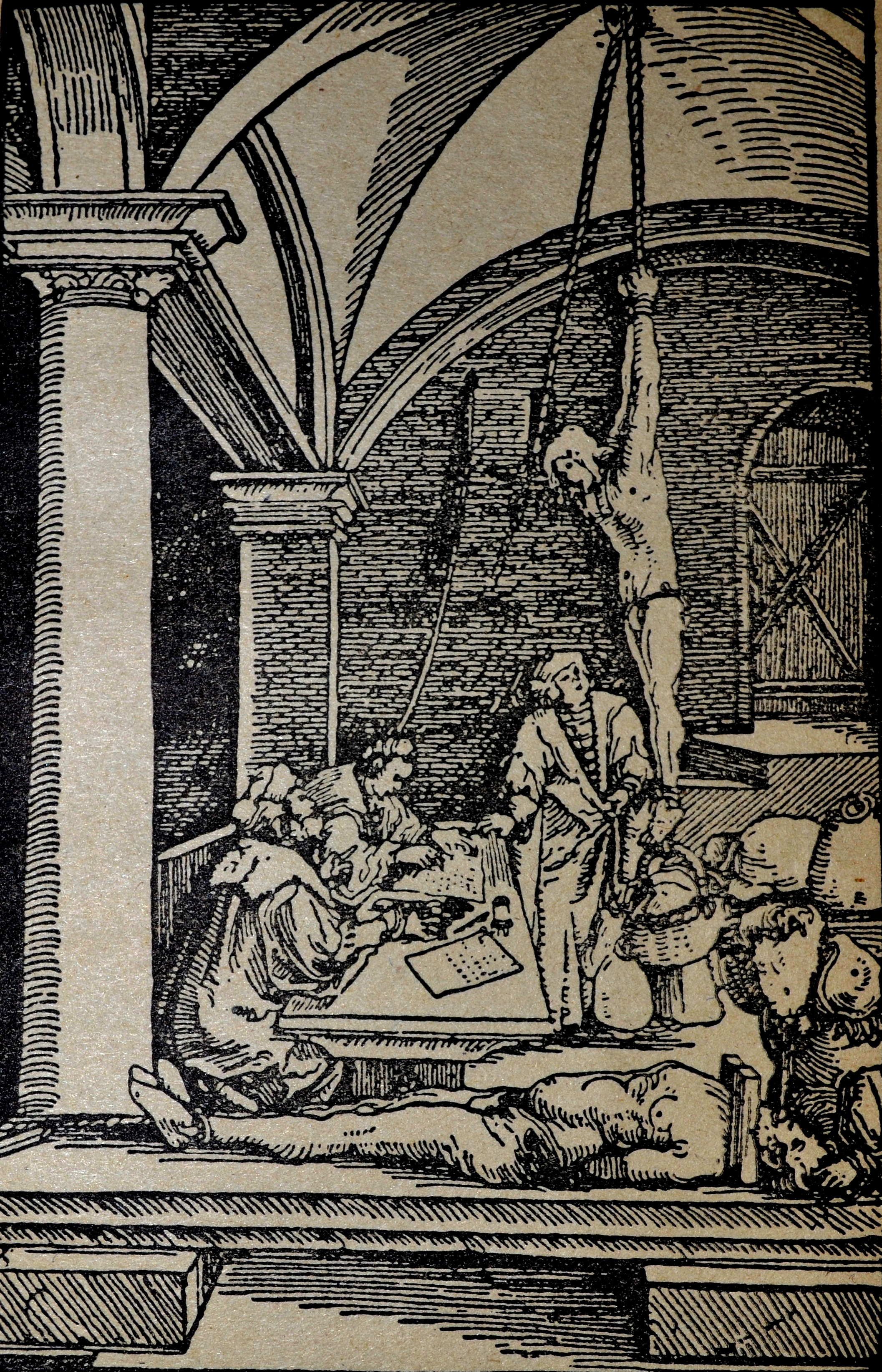 Zasliševanje z natezalnico, lesorez iz knjige Rosenow: Kulturbilder aus den Religionskämpfen des 16. und 17. Jarhunderts, objavljen v knjigi Bratka Krefta Velika puntarija kot ilustracija k 4. dejanju.